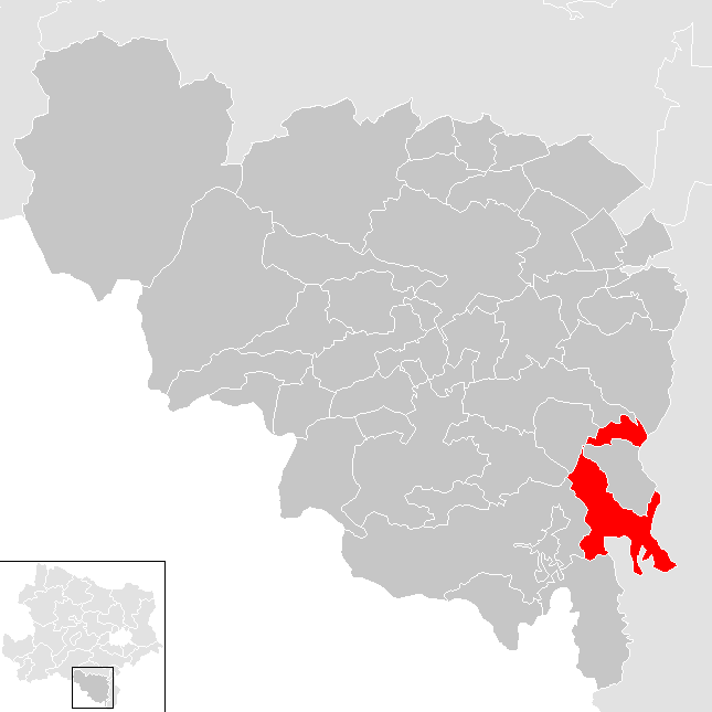 Bezirk Neunkirchen